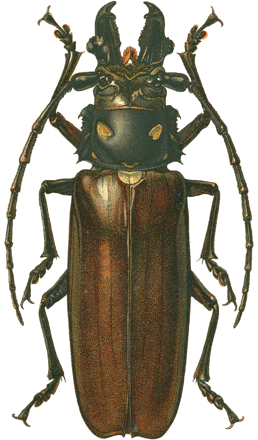 Callipogon relictus